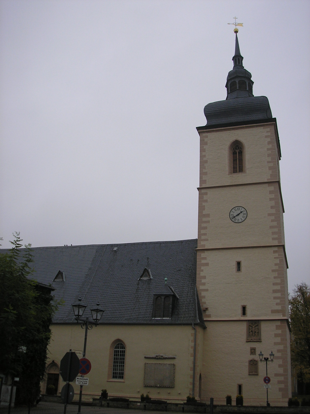 Die Kirche St. Bartholomäus von Wiehe (Thüringen).